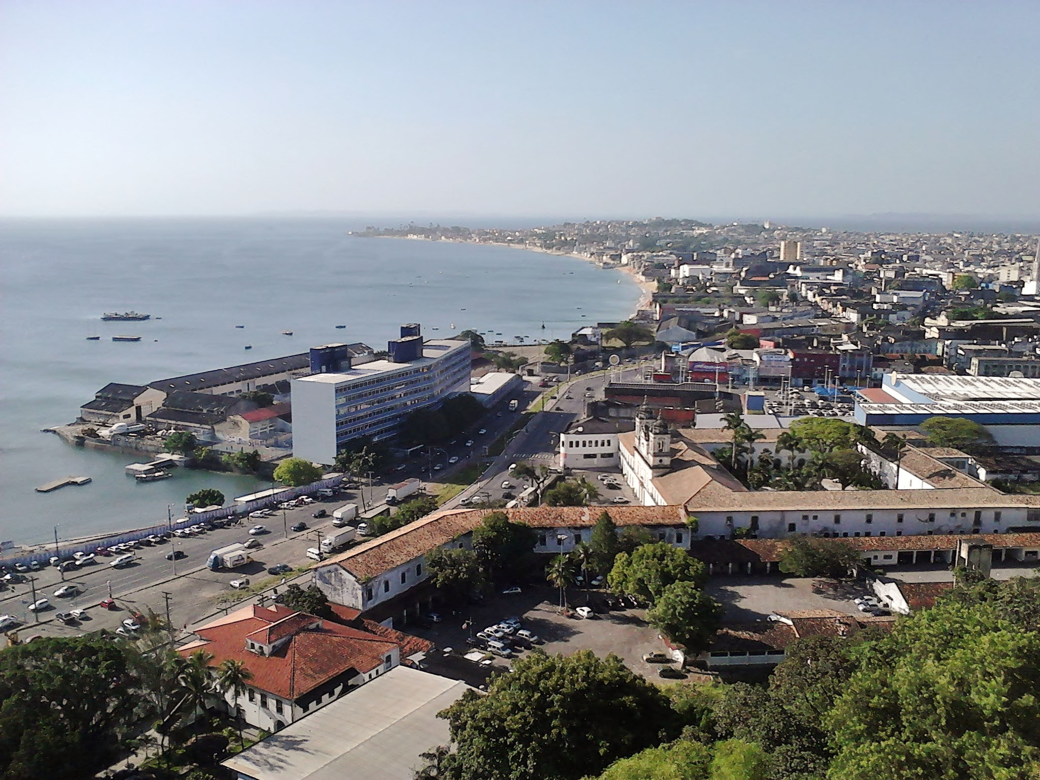 Vista da Baía de Todos os Santos Fotos Celular Motorola EX119 Salvador - Bahia - 2012